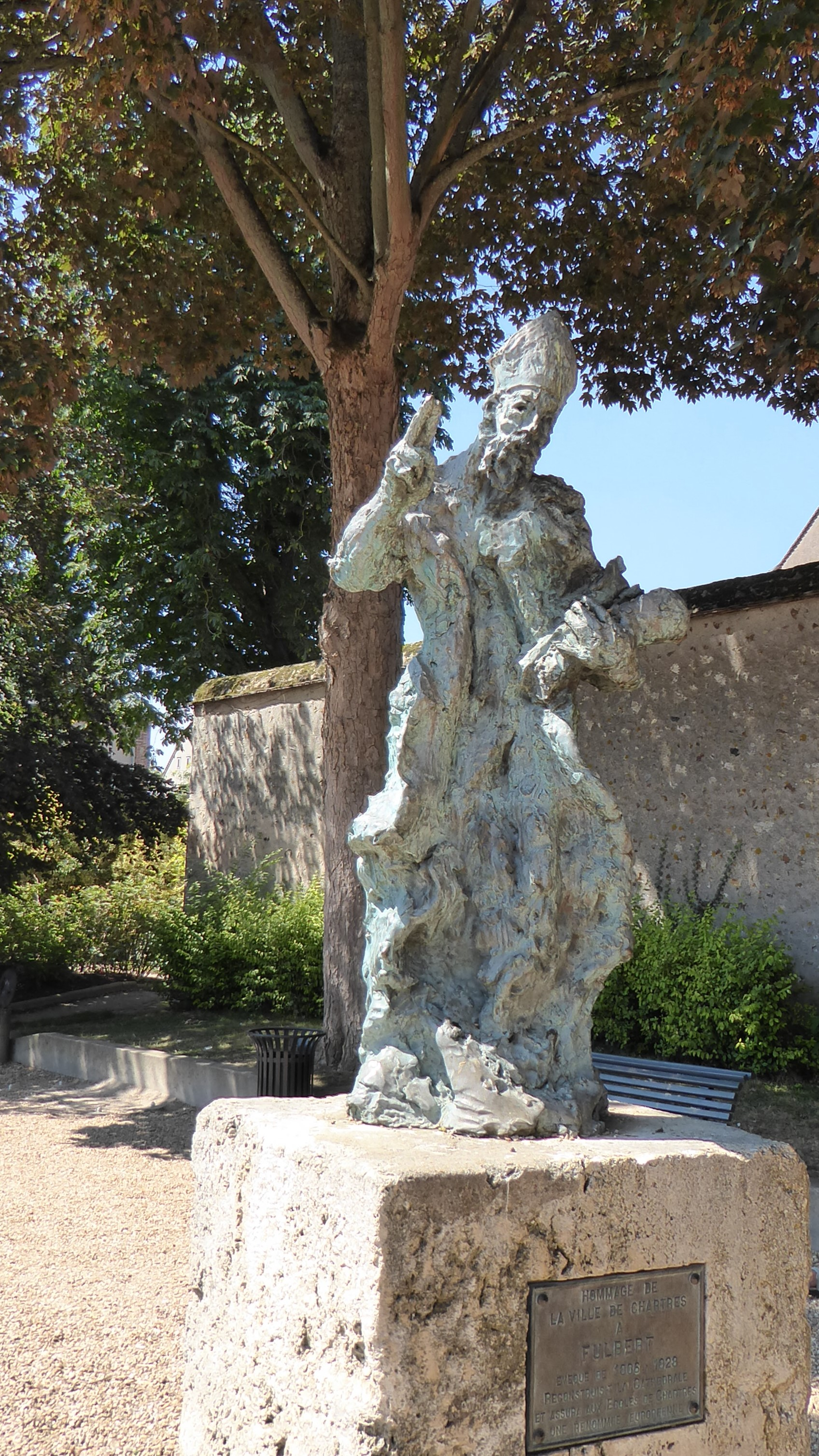 statue de Fulbert, parvis de la cathédrale de Chartres, Eure-et-Loir, France.